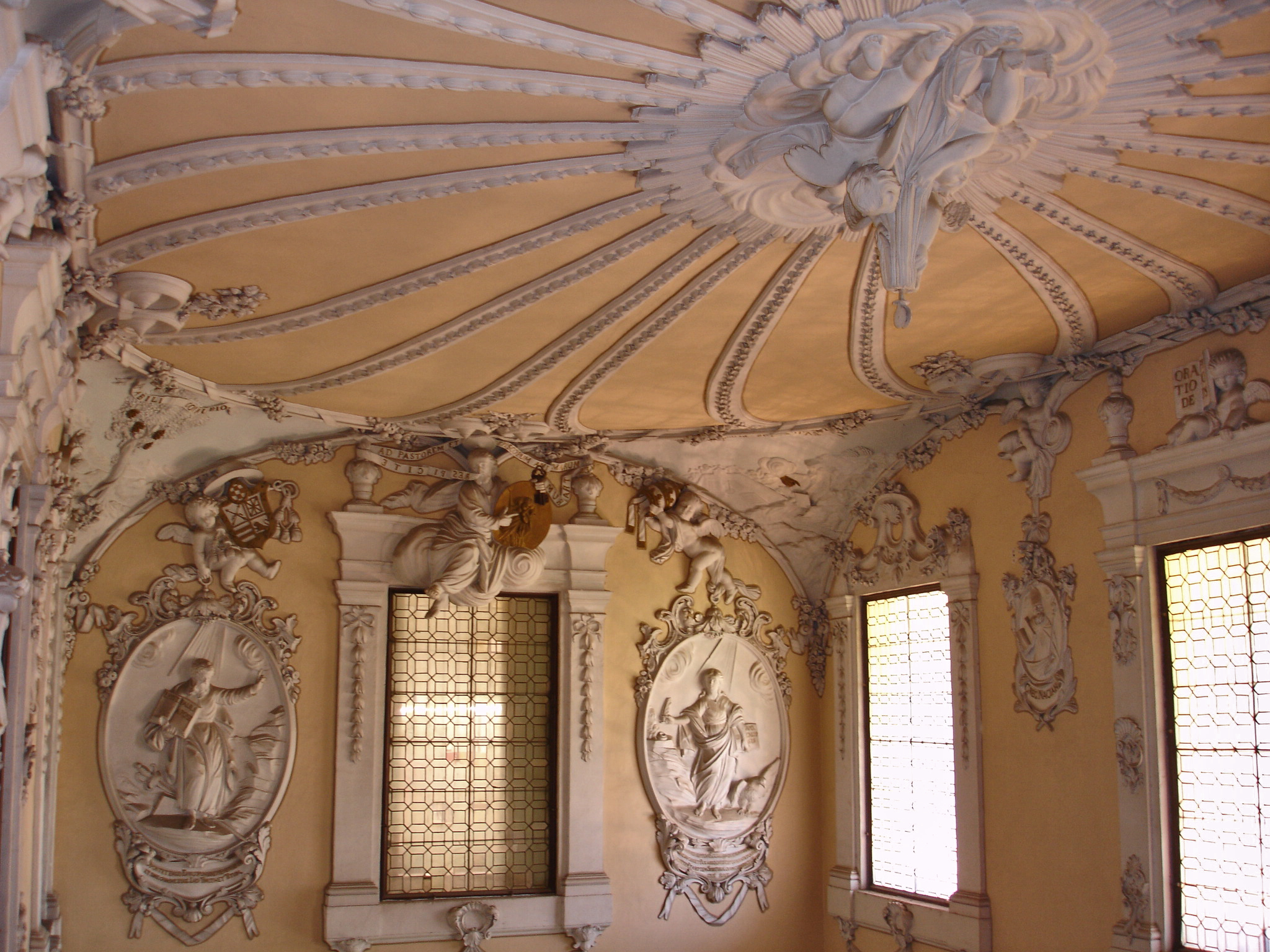 Escalera de la Biblioteca Provincial de Córdoba (España).